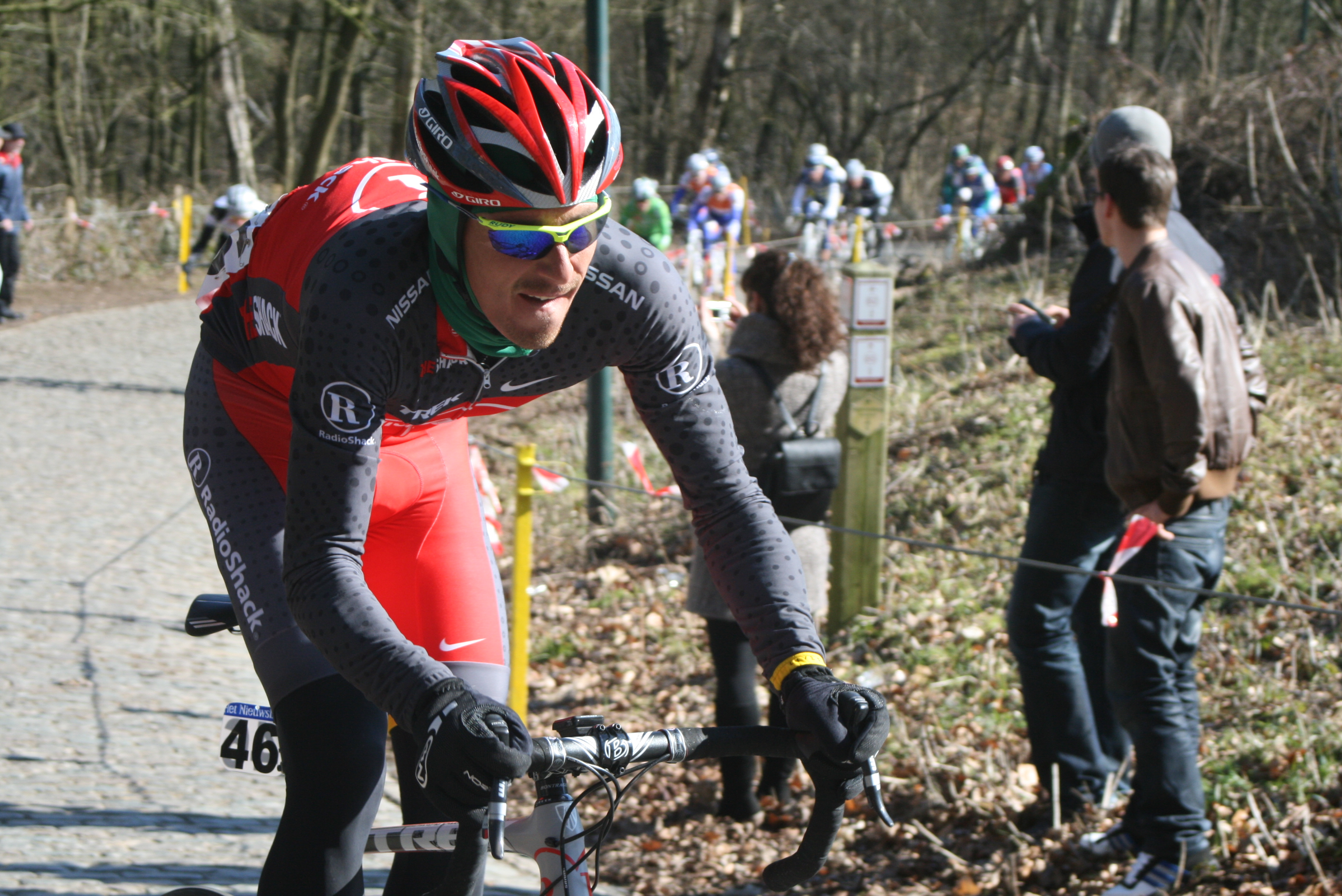 Dmitriy Muravyev au mont Kemmel pendant les Trois jours de Flandre occidentale 2010